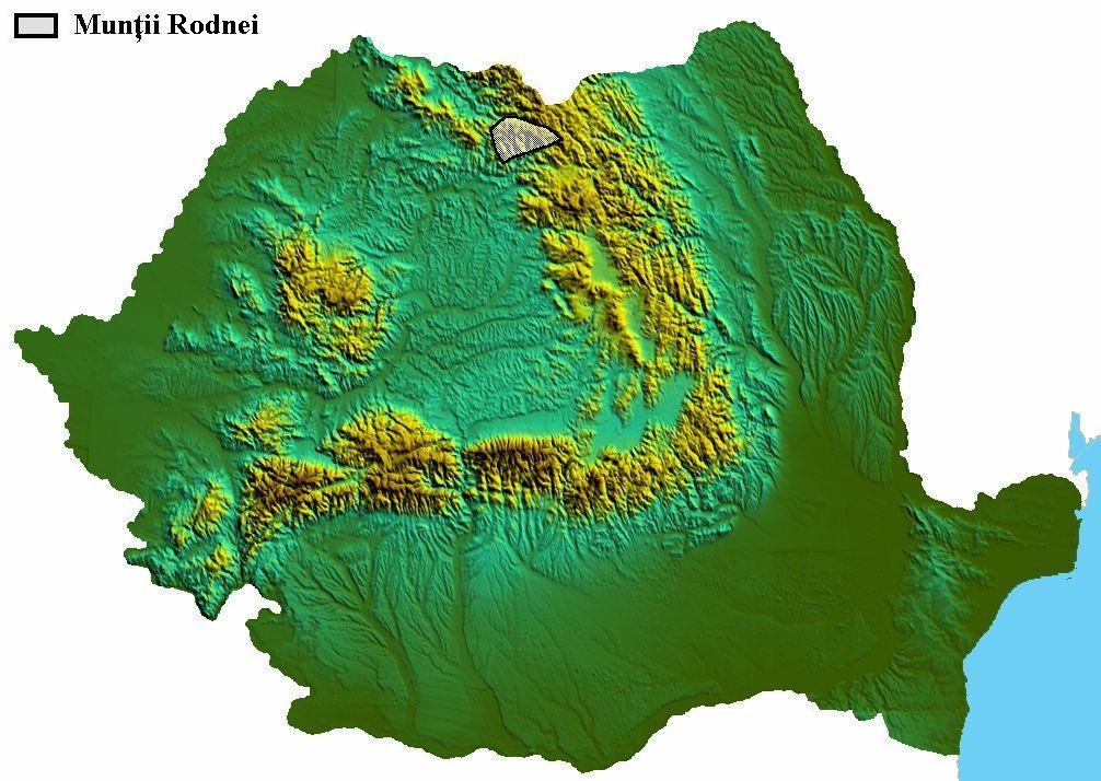 Muntii Rodnei